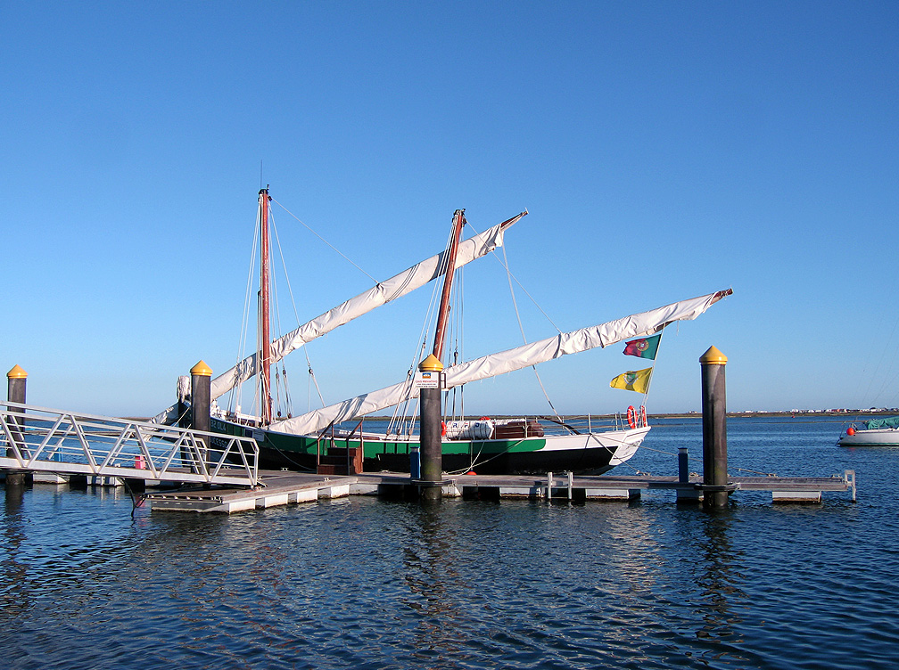 La caïque Bom Sucesso Olhao - Portugal